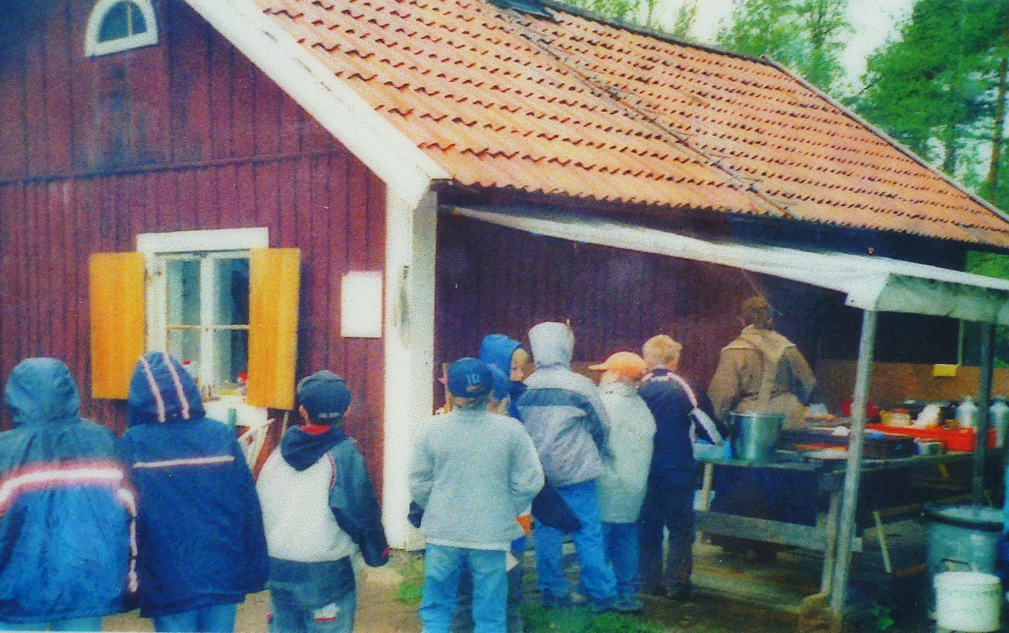 Tuppstugan, ungdomsverksamhet (stugan brändes ner 2004)